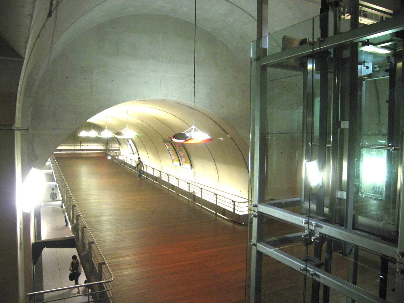 RER Paris ligne E couloir de la station Haussman Saint Lazare Lieu : Paris, France Date : Juin 2006 Auteur : Pline photo personnelle